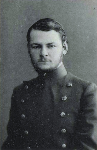 Пучков, Александр Сергеевич